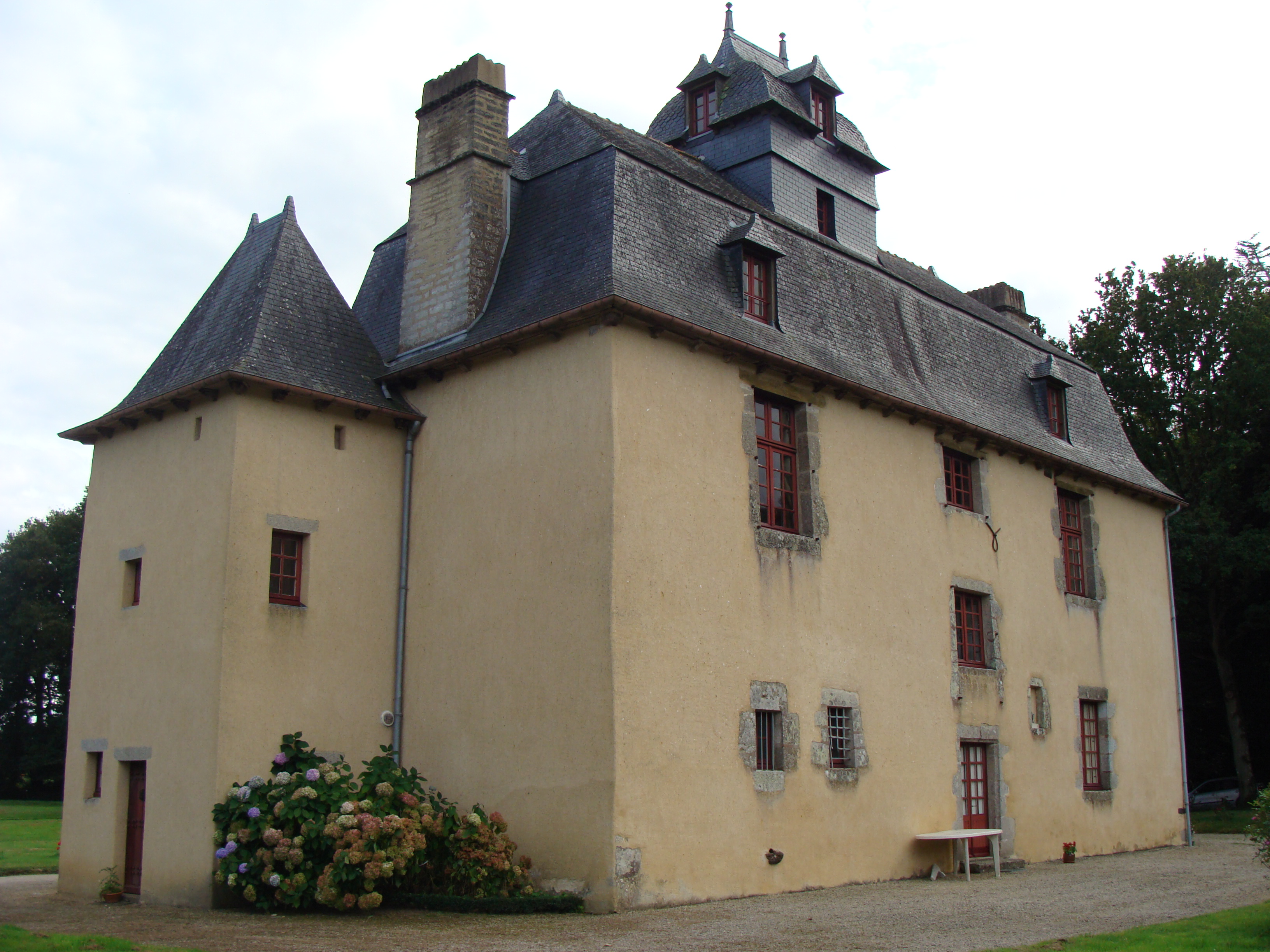 Manoir de la Louverie, (inscription, 2005) .